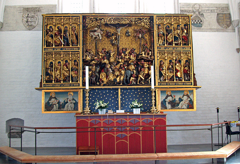 Fløjatertavlen fra begyndelsen af 1500-tallet tilskrives Claus Bergs værksted i Odense